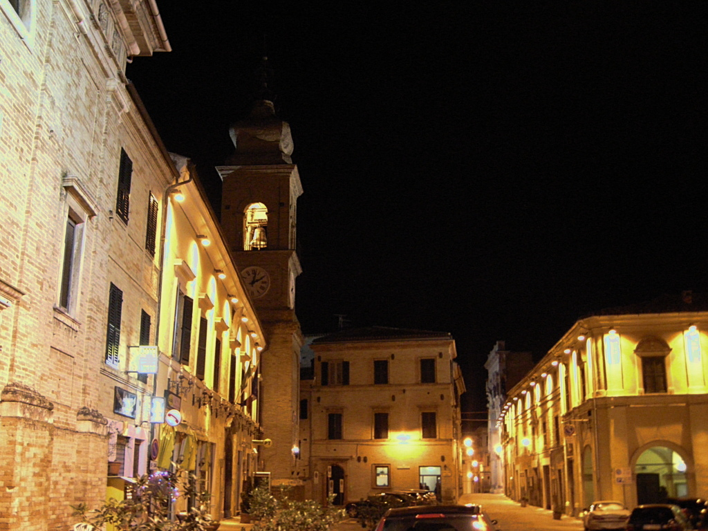 Pollenza (Macerata). Piazza... (Boh! Ce l'avrà un nome.)